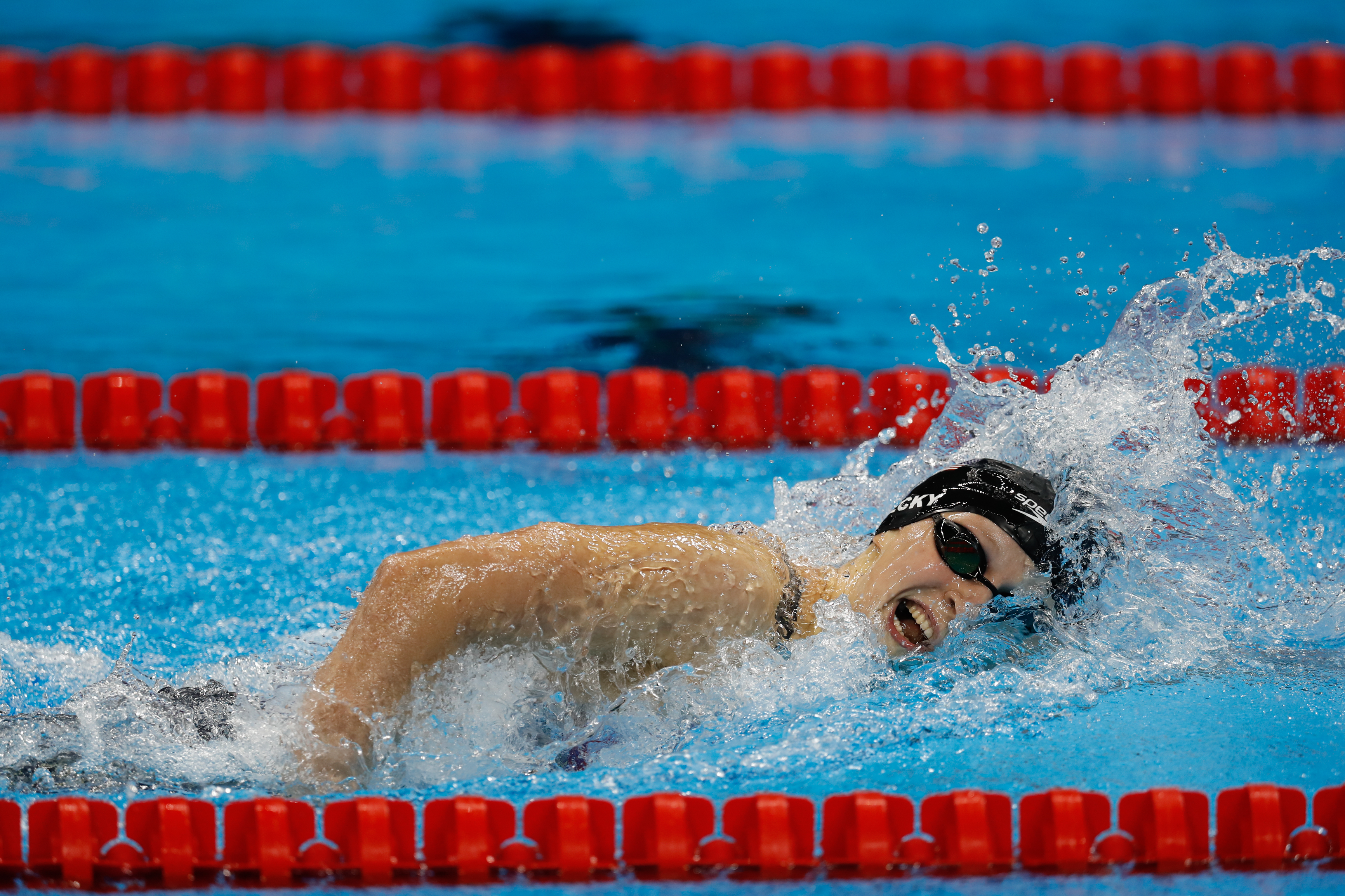 Rio de Janeiro - Nadadora norte-americana Katie Ledecky bate recorde mundial e leva medalha de ouro nos 400m livre nos Jogos Olímpicos Rio 2016 (Fernando Frazão/Agência Brasil)